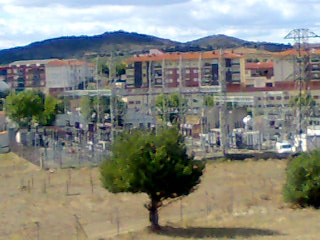 Susbestación eléctrica de Plasencia